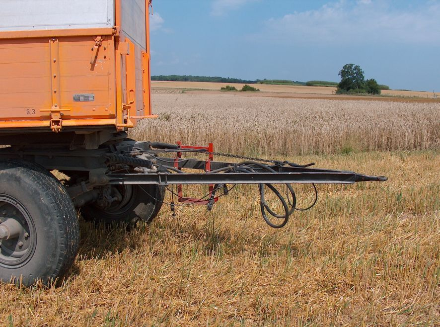 Deichsel (mit Zugöse) eines druckluftgebremsten landwirtschaftlichen Anhängers